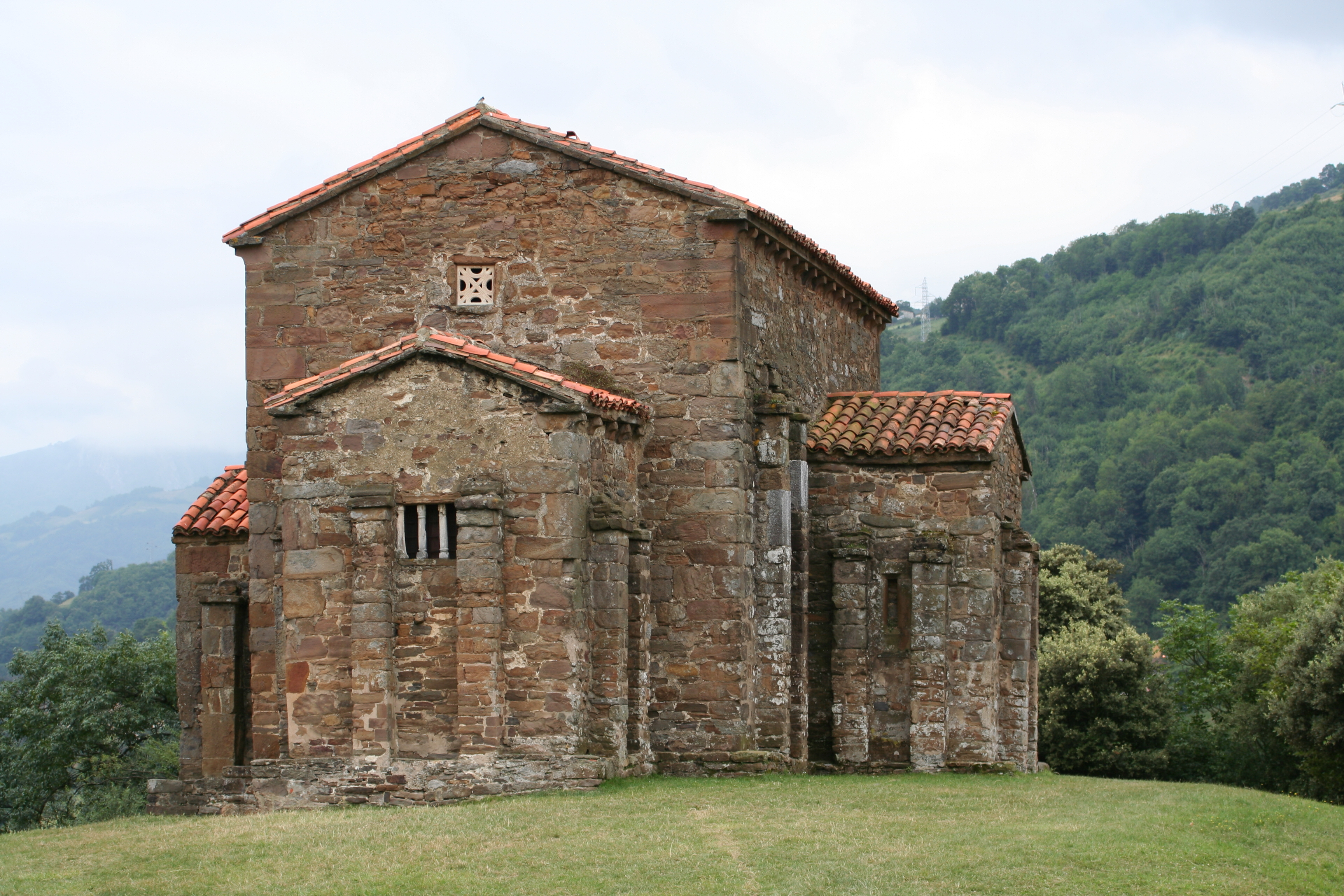 Iglesia Prerrománica de Santa Cristina de Lena